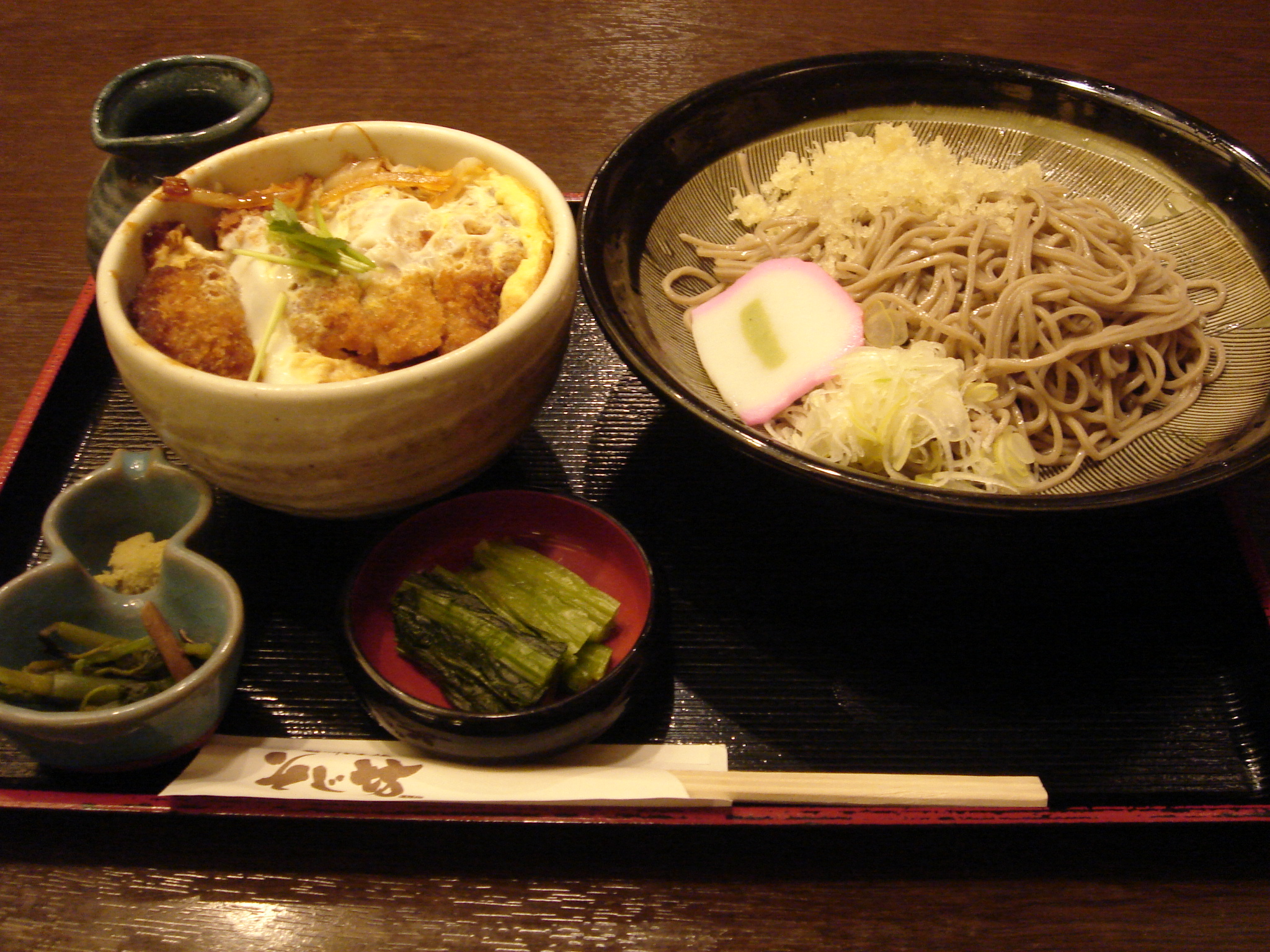 カツ丼定食そじ坊